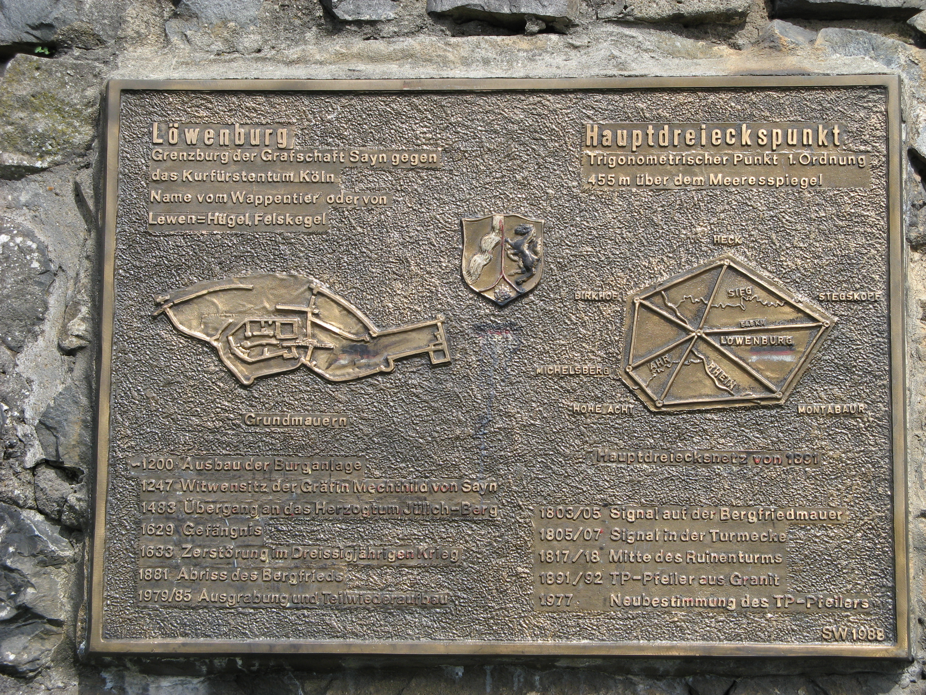 Hauptdreieckspunkt Löwenburg (Siebengebirge), Bronzetafel (1988) von Sigrid Wenzel